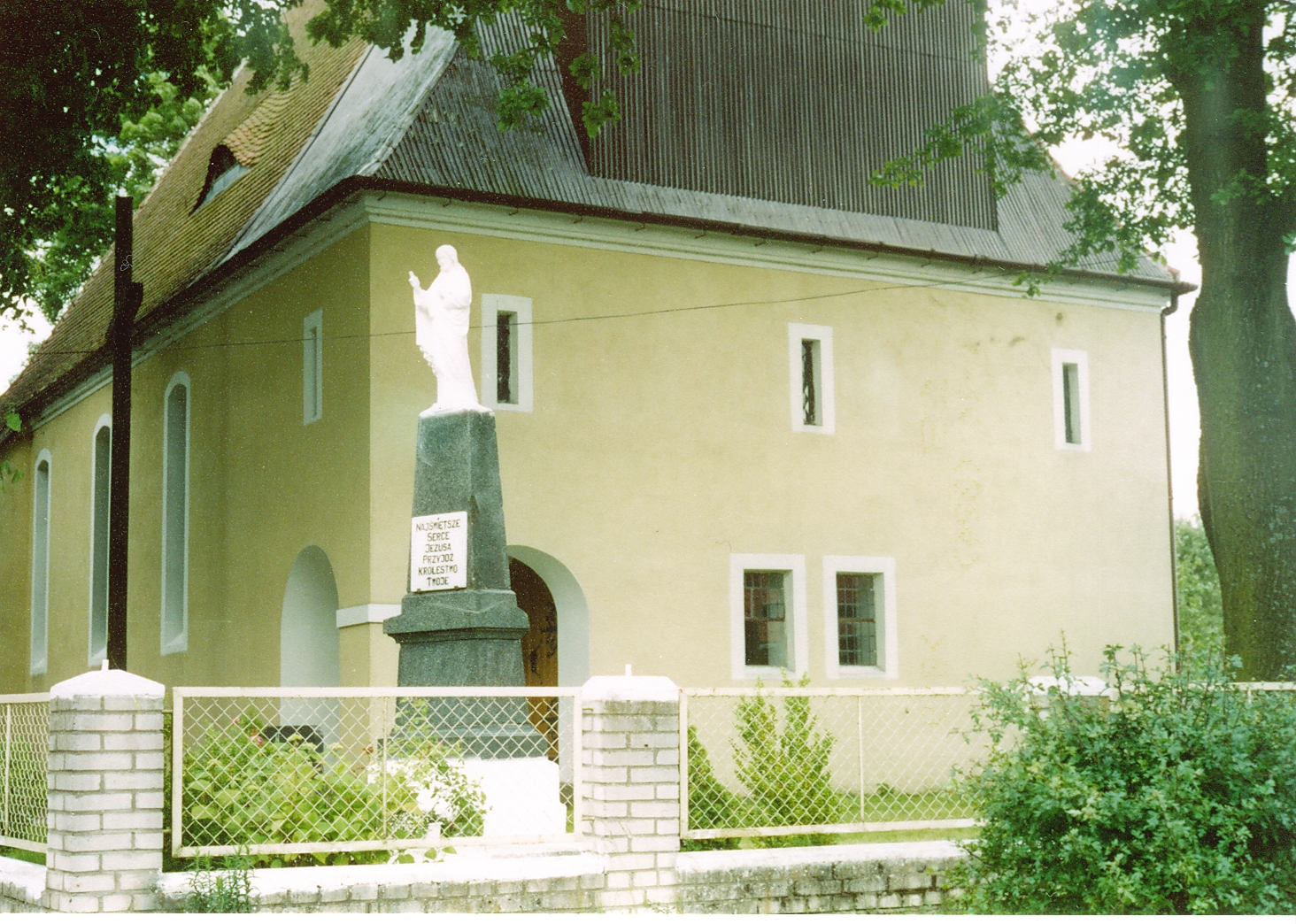 Bierkowo, church